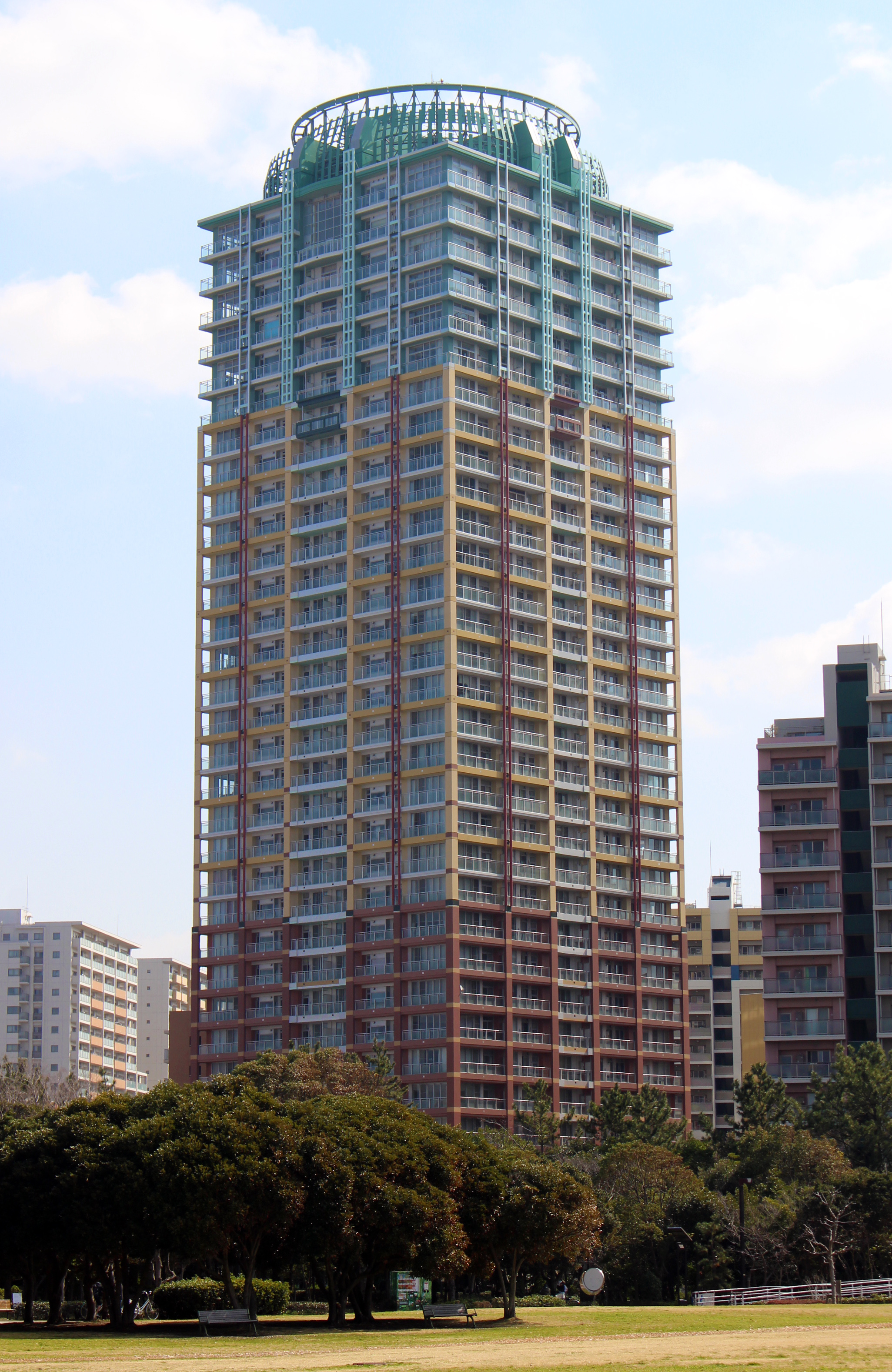 Central Park East 幕張パークタワー